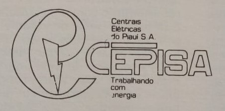 Emblema de 1979 da antiga Centrais Elétricas do Piauí S.A. Atual Companhia Energética do Piauí.